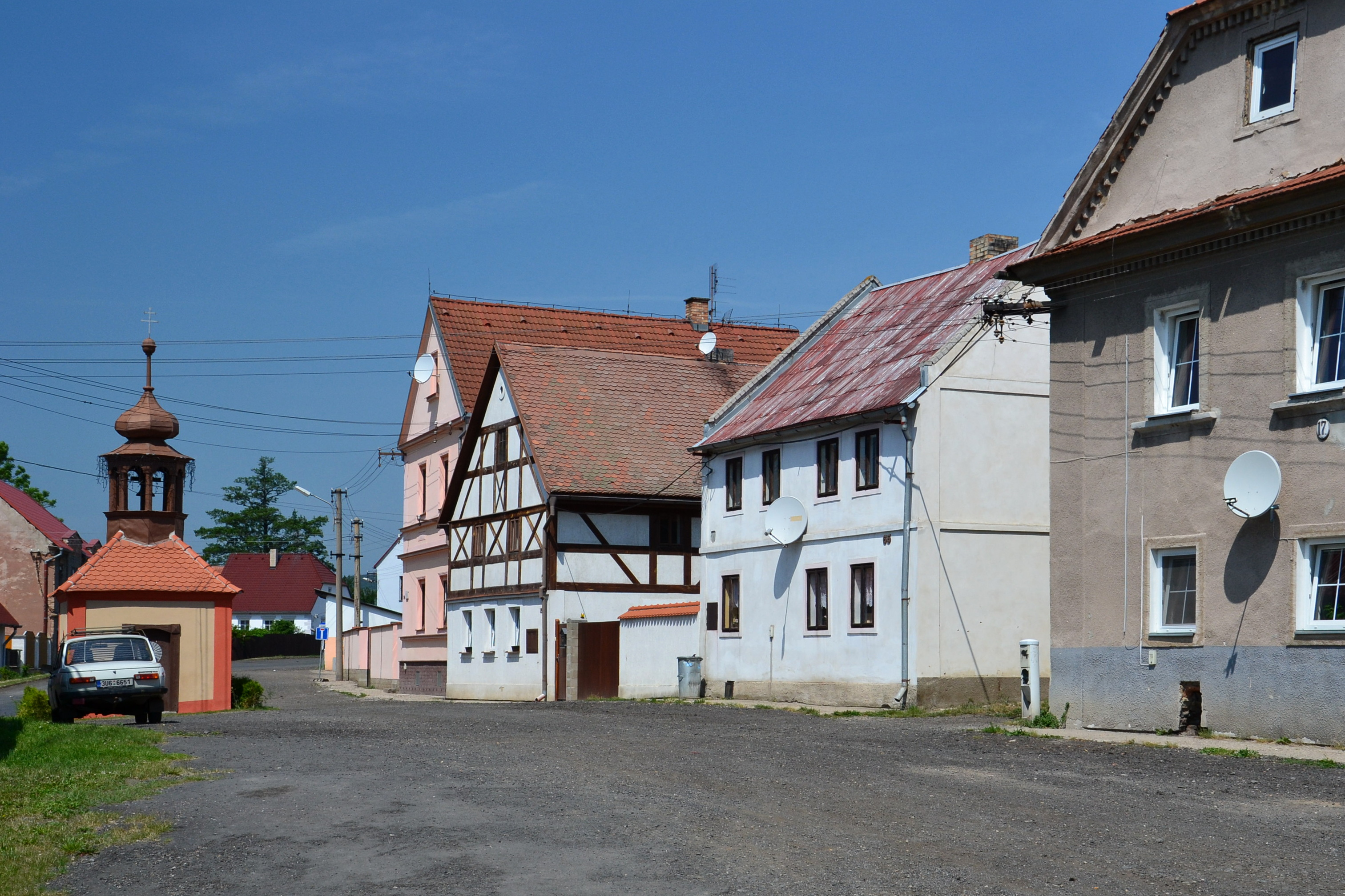 Náves s kaplí